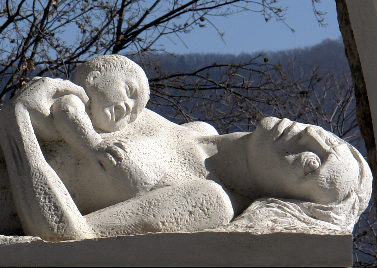 Sant' Anna di Stazzema, Skulptur Mutter und Kind (im Mahnmal)